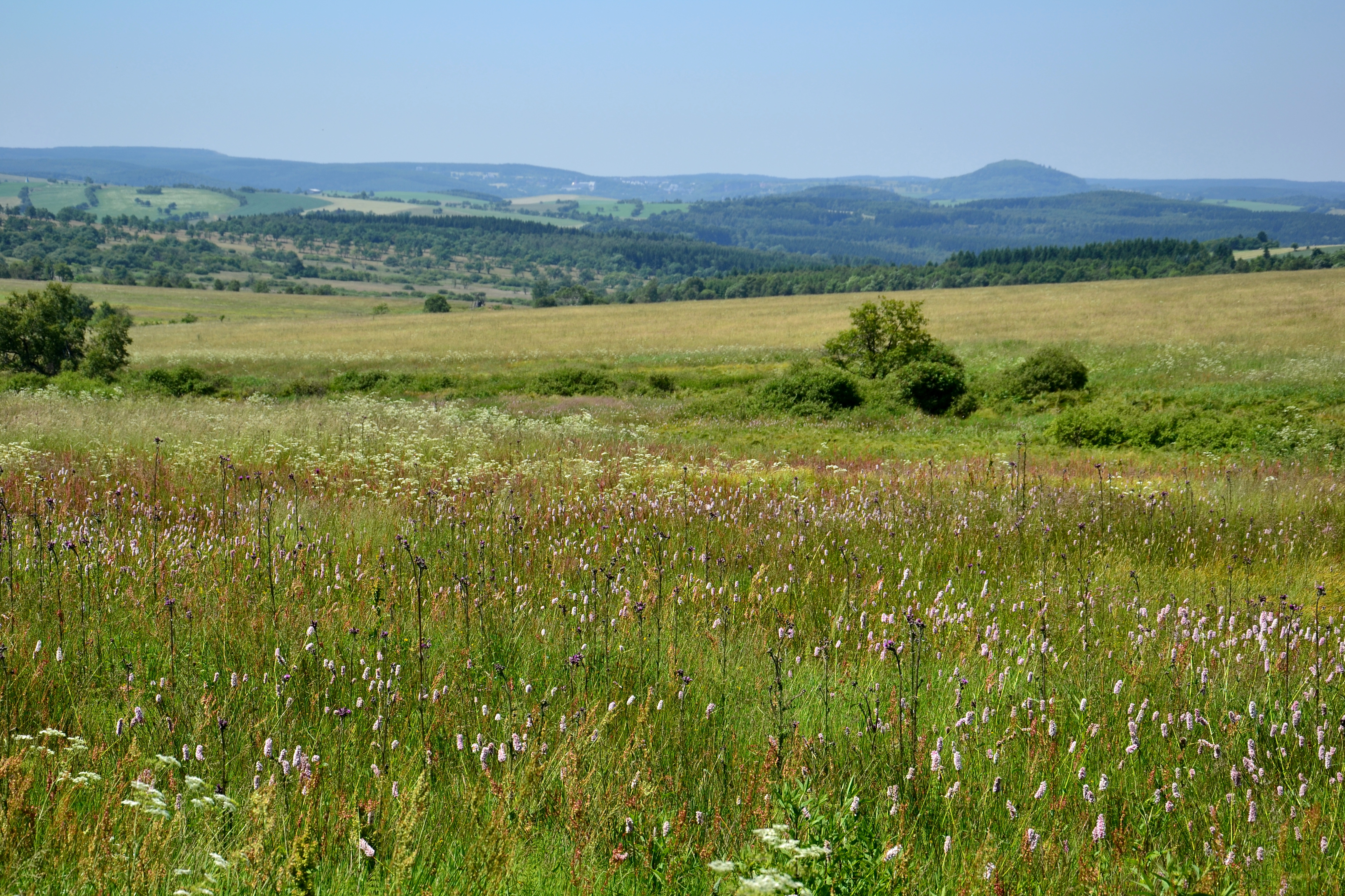 Východní část chráněného území